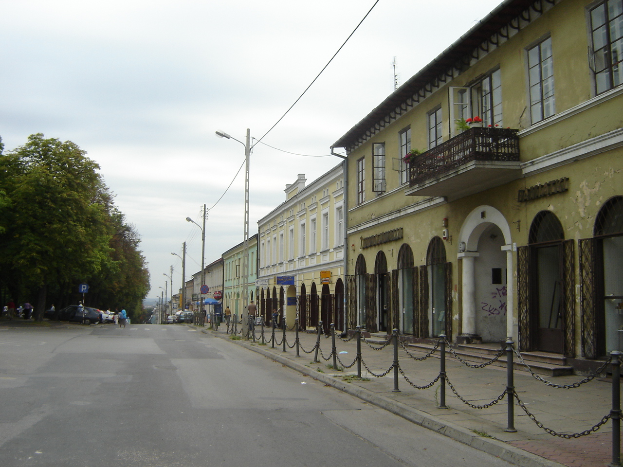 Częstochowa - Ulica 7 Kamienic